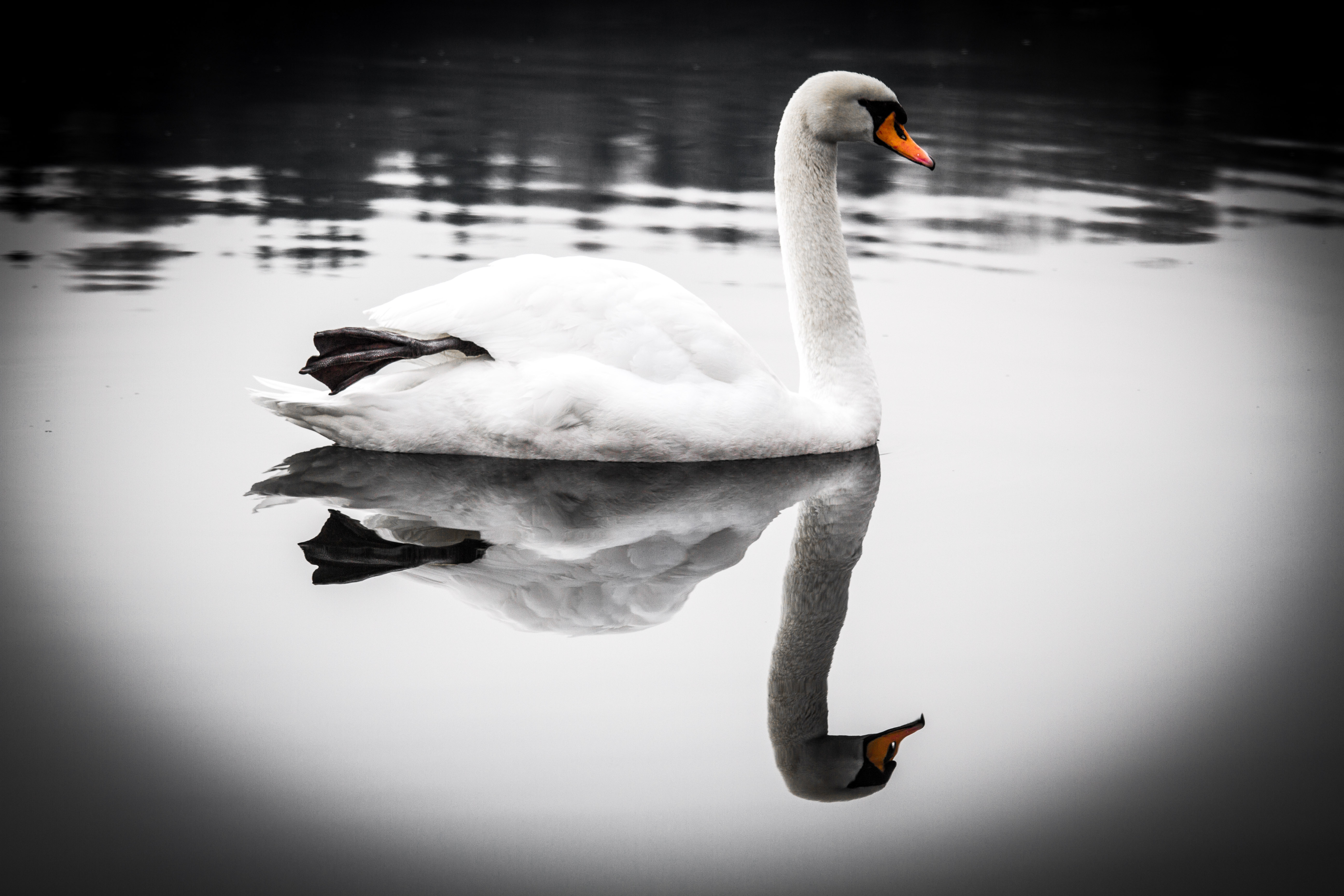 Schwan am Baggersee Kirchentellinsfurt